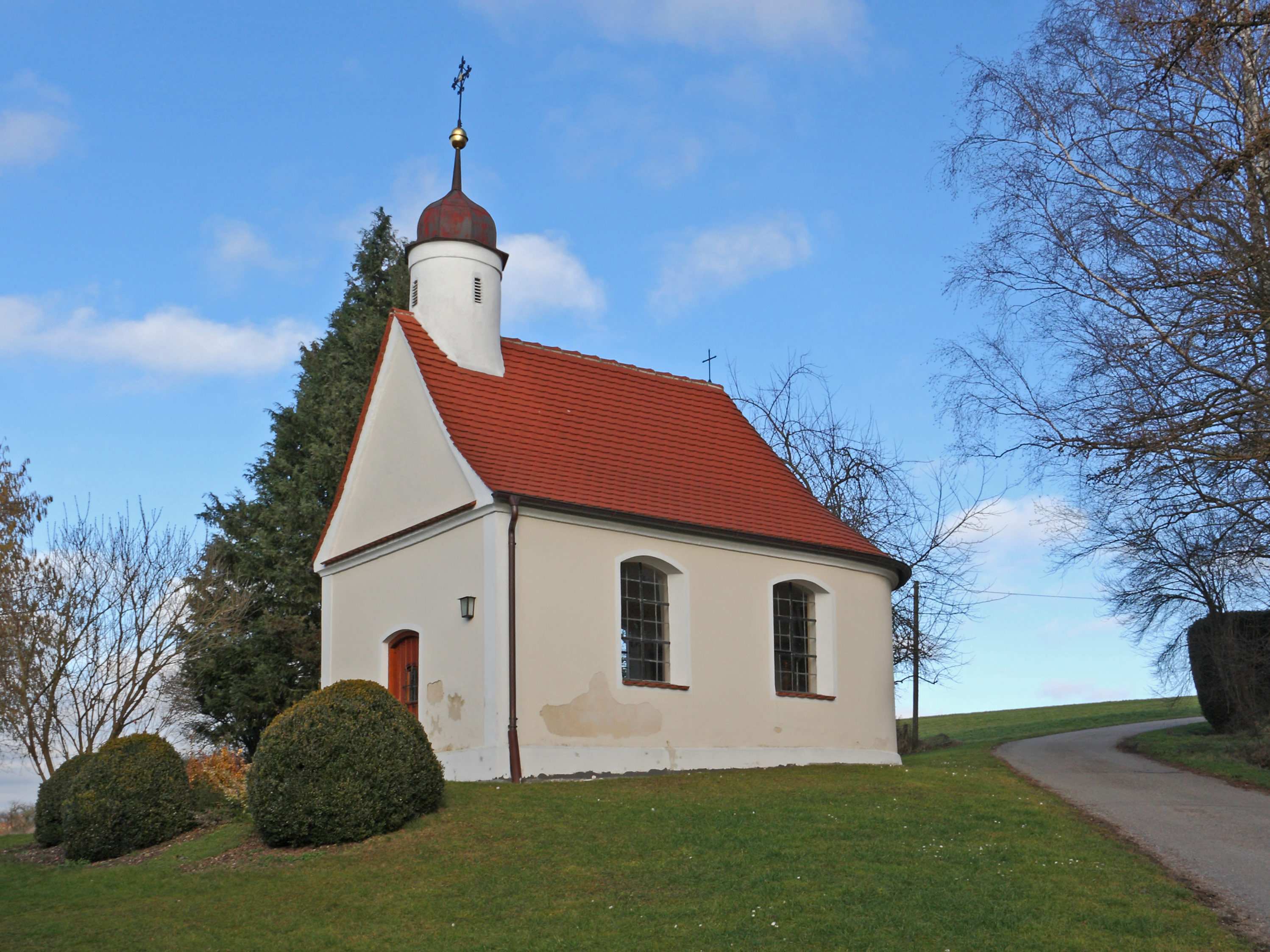 Kapelle St. Leonhard in Nordhofen; Südwestansicht